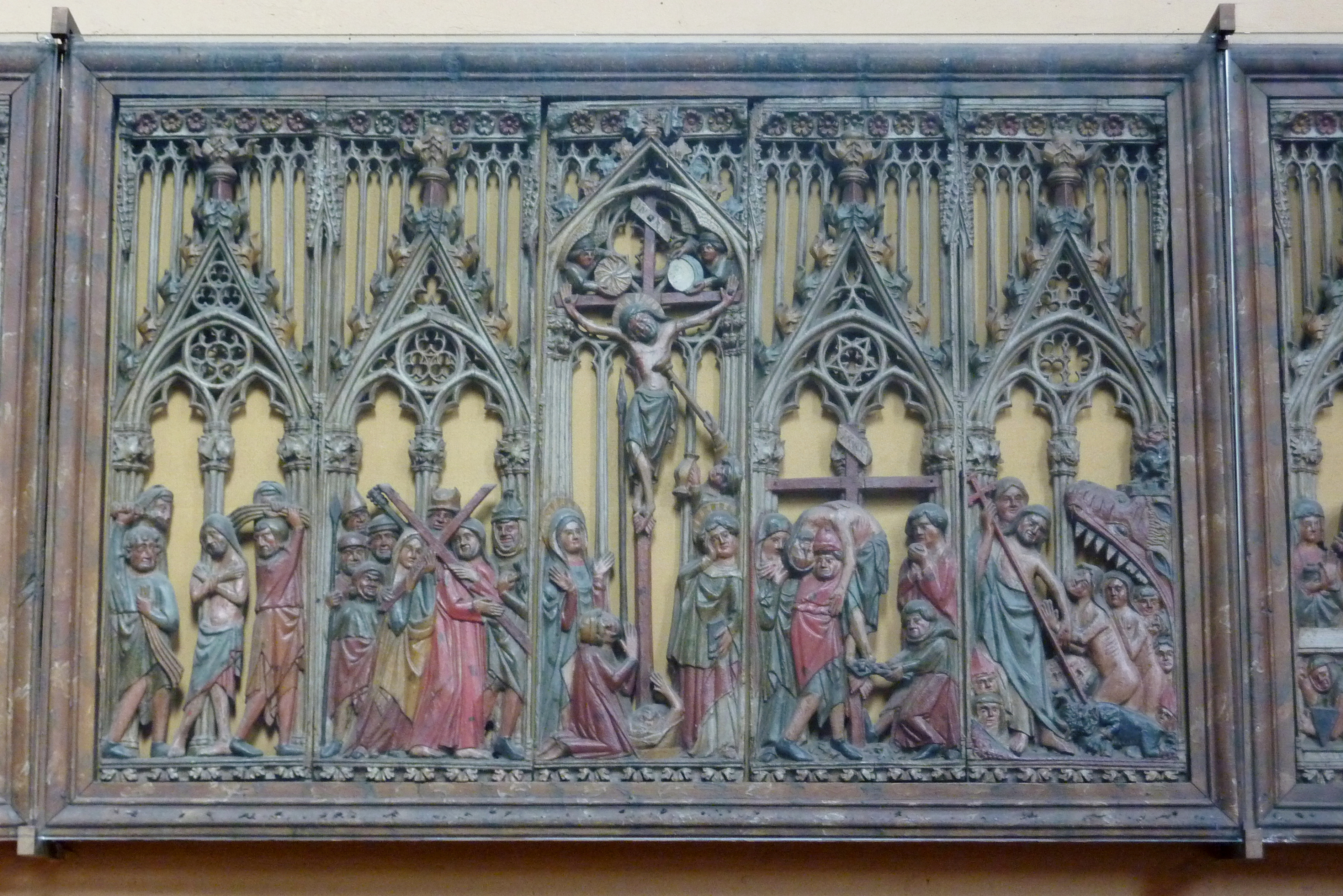 Katholische Pfarrkirche Saint-Clair-Saint-Léger in Souppes-sur-Loing im Département Seine-et-Marne in der Region Île-de-France (Frankreich), Altarretabel aus dem 16. Jahrhundert, nach mittelalterlichem Vorbild, Darstellung: Leidensgeschichte Jesu; Ausschnitt: Geißelung, Kreuztragung, Kreuzigung, Kreuzabnahme und Höllenfahrt Jesu